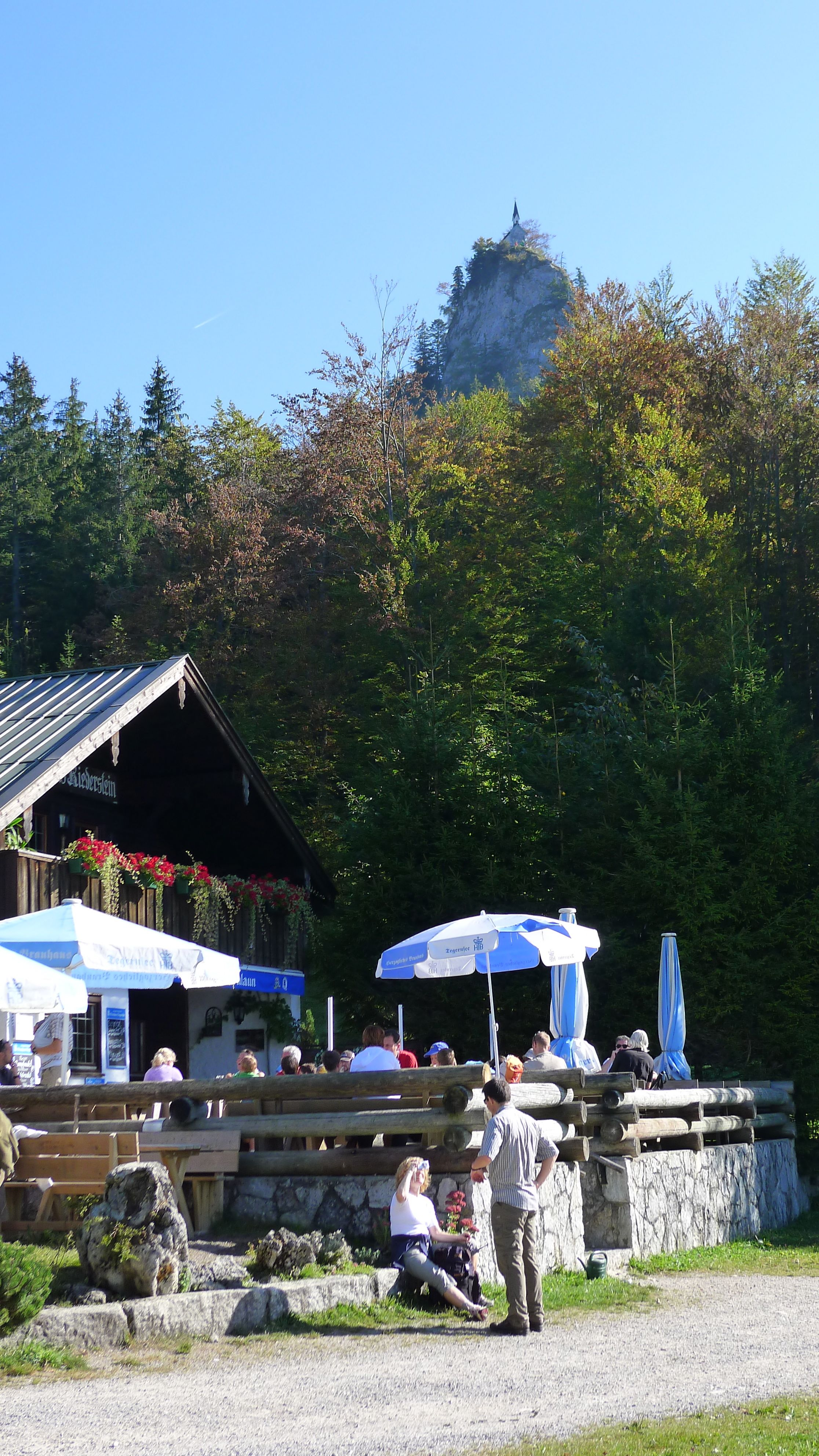 Riederstein-Kapelle auf dem Felssporn über dem Berggasthaus Riederstein am Galaun, Nähe Tegernsee, Bayern